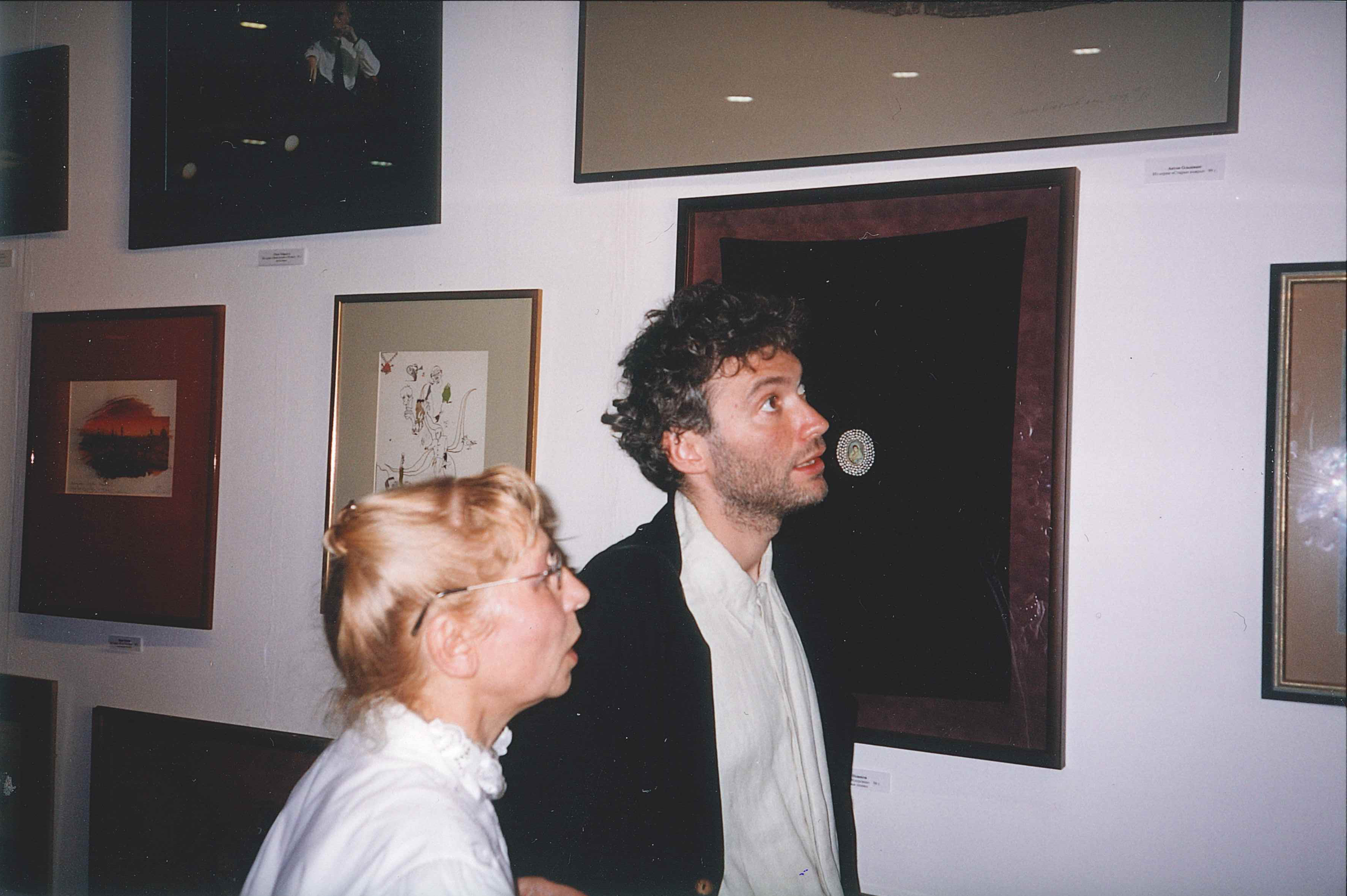 Галина Осецимская и Павел Папперштейн на выставке "Новые русские коллекции"